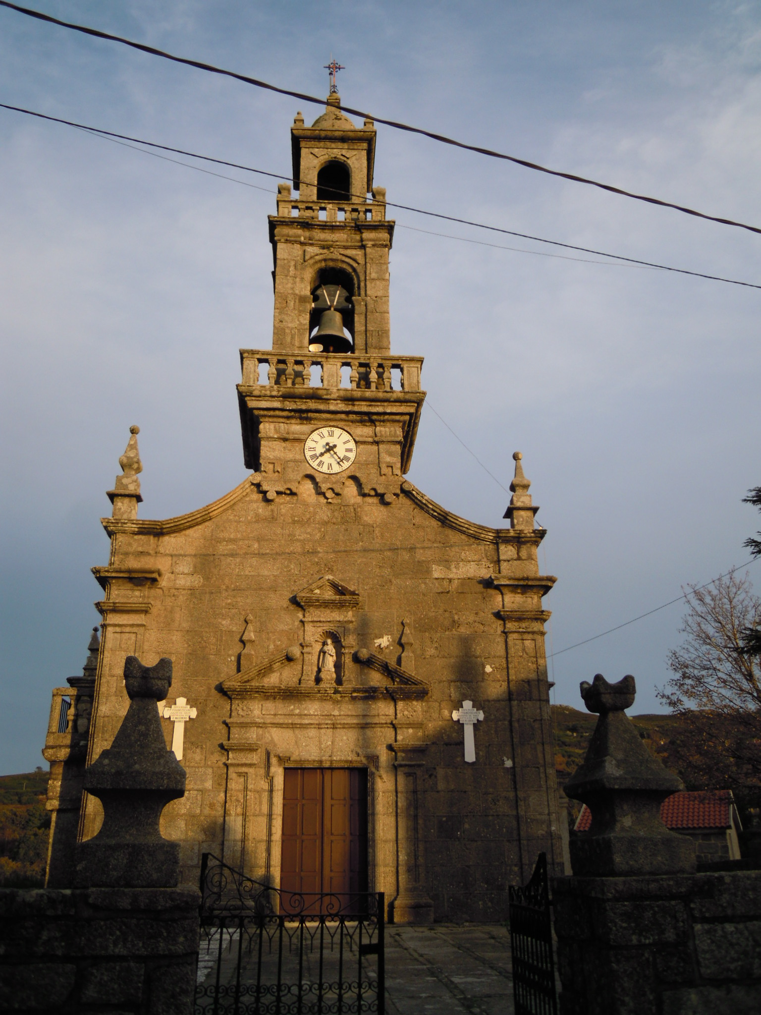 Fachada da igrexa parroquial de Seixido (Lama).